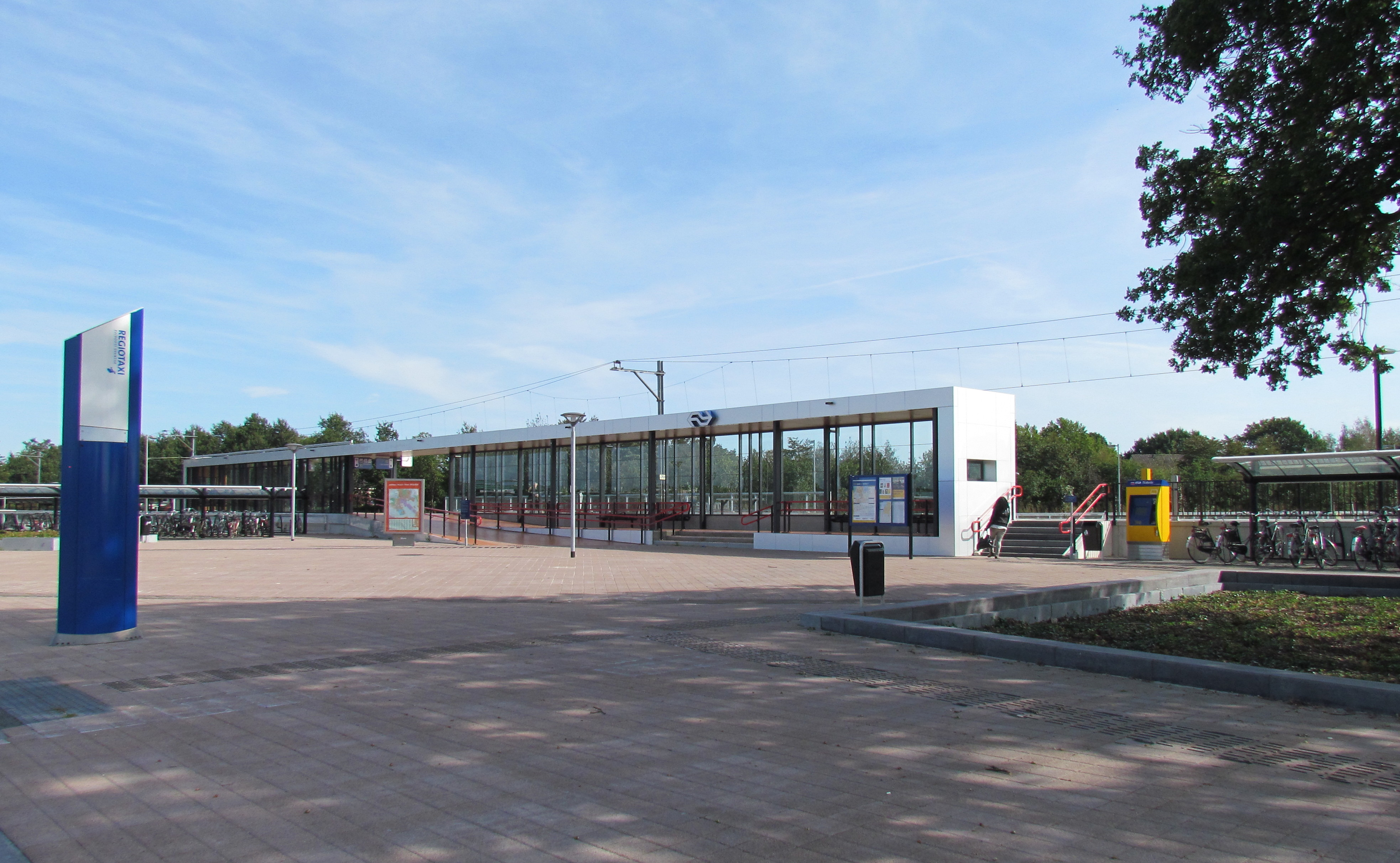 Station Emmen Zuid